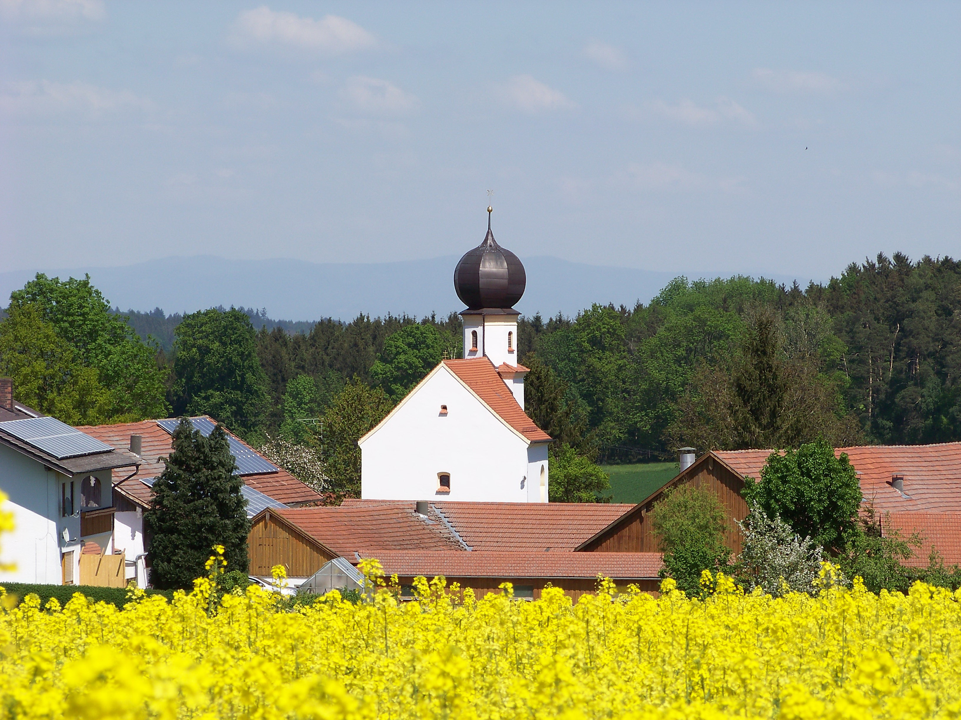 Bayerbach, Pram, Haus Nr. 9. Filialkirche St. Martin und Nikolaus. Saalkirche, von 1758, Apsis romanisch, mit kleinem Turm über der Apsis, mit Achteckaufsatz und Zwiebelkuppel; mit Ausstattung. Im Hintergrund ist die Shilouette des Bayerischen Waldes zu sehen.